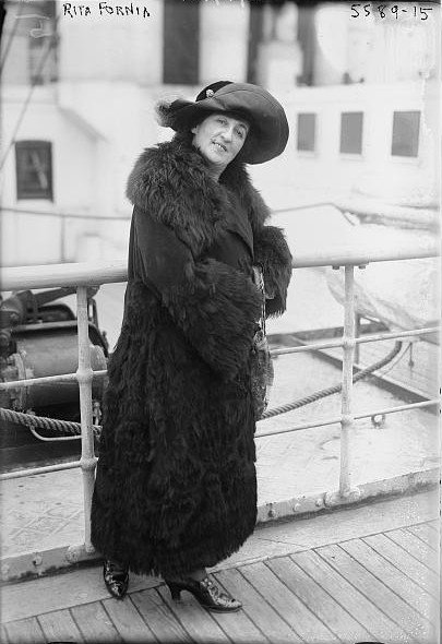 Rita Fornia [orig. Regina Newman] (1878-1922), American soprano